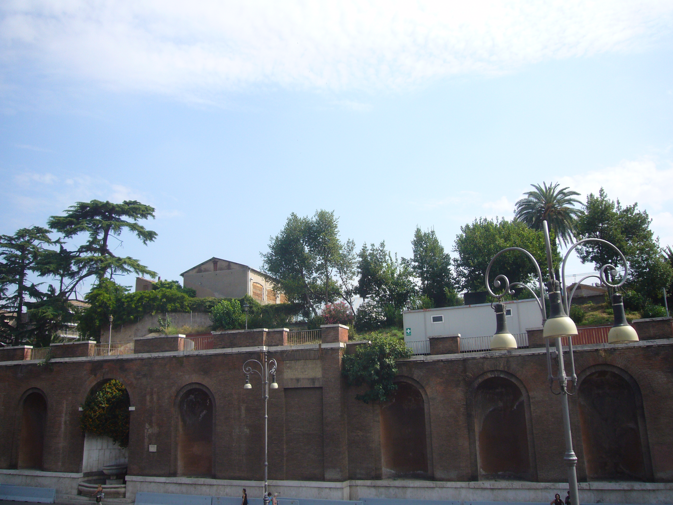 Roma, palazzo Rivaldi. Ciò che rimaneva del giardino nel 2013.